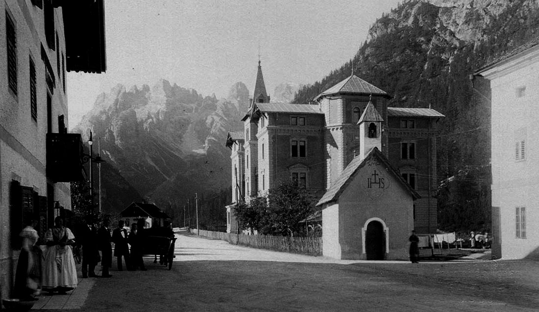 Ex paese di Landro, Alto Adige, Italia. Uploaded first to Italian Wikipedia: Author /: Luca Lorenzi (user:Llorenzi) License / Licenza: GNU